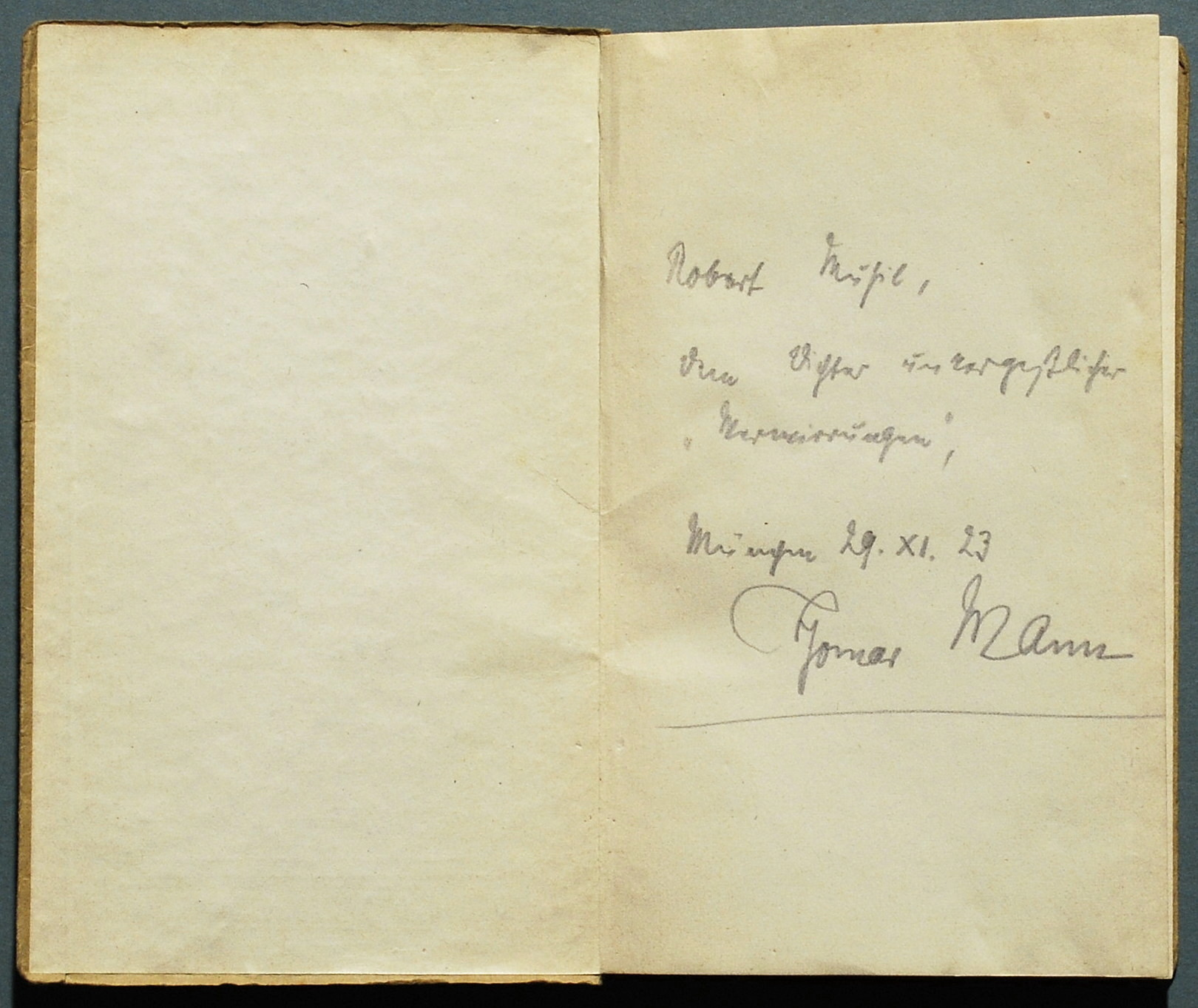 Widmung Thomas Manns an Robert Musil in "Bekenntnisse des Hochstaplers Felix Krull", Erstdruck der Ausgabe von 1923.